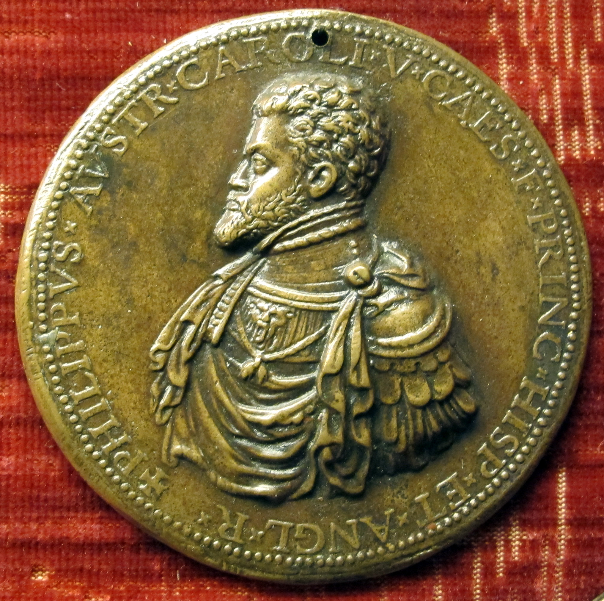 Medaglia di filippo II di spagna e d'inghilterra